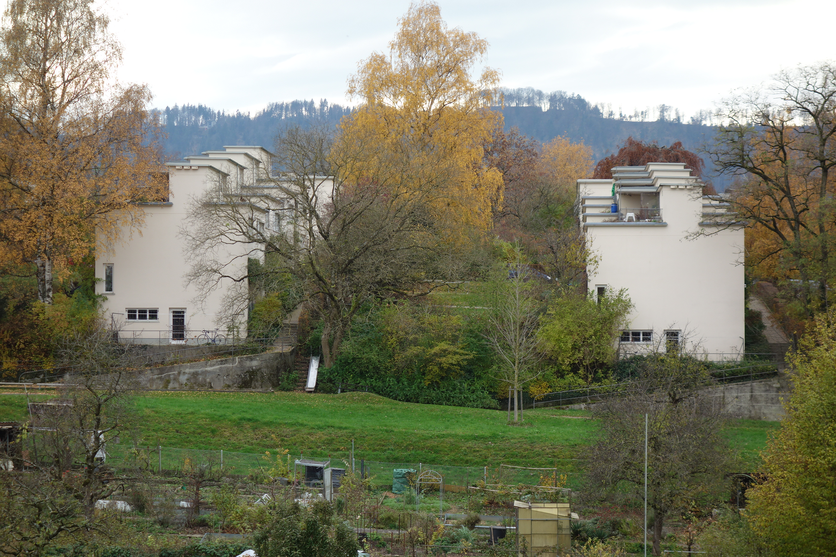 Werkbundsiedlung Neubühl, Zürich-Wollishofen: 2019